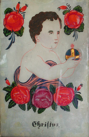 Hinterglasbild "Jesus", Sandl, 19. Jh.